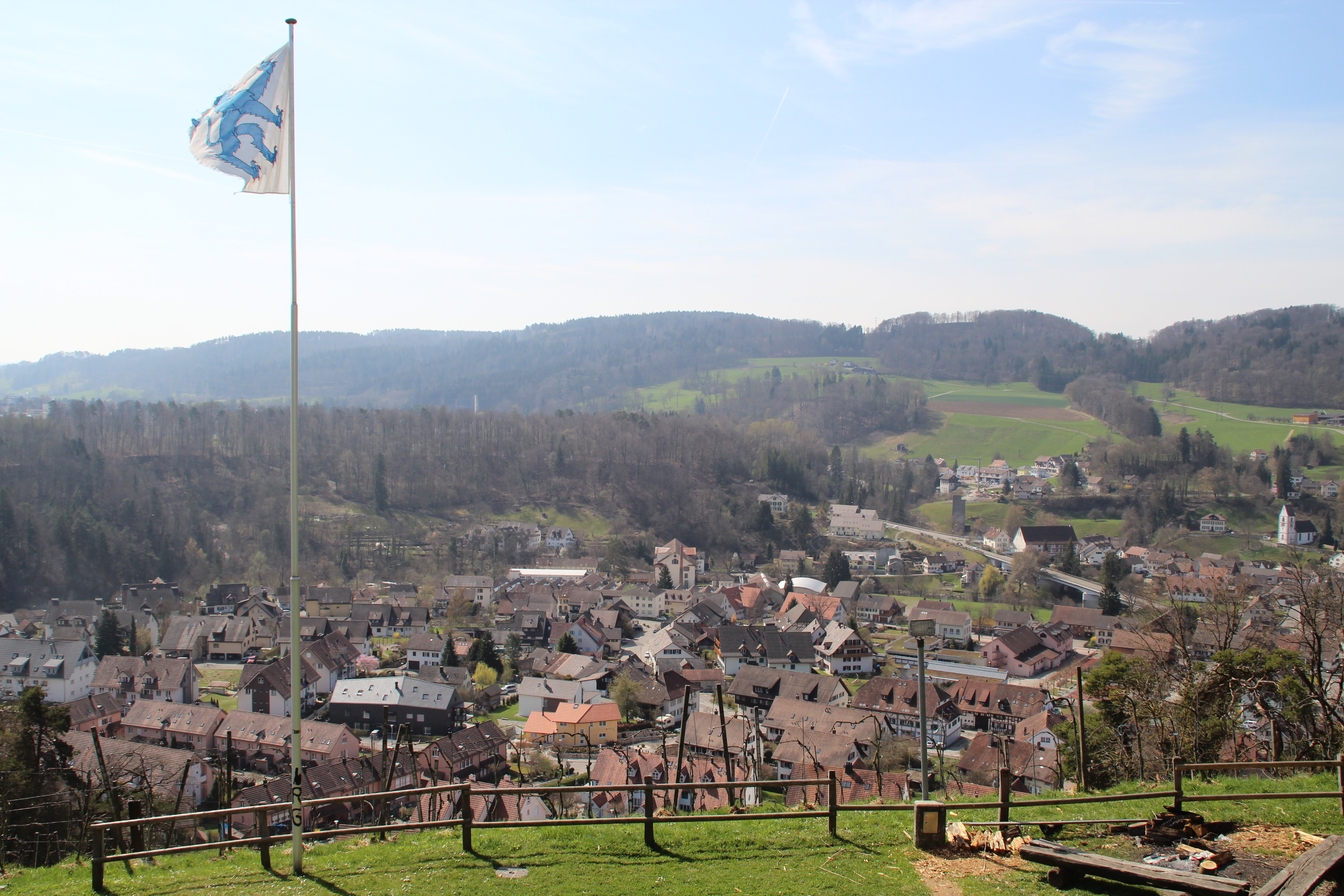 Freienstein-Teufen nach Südwesten